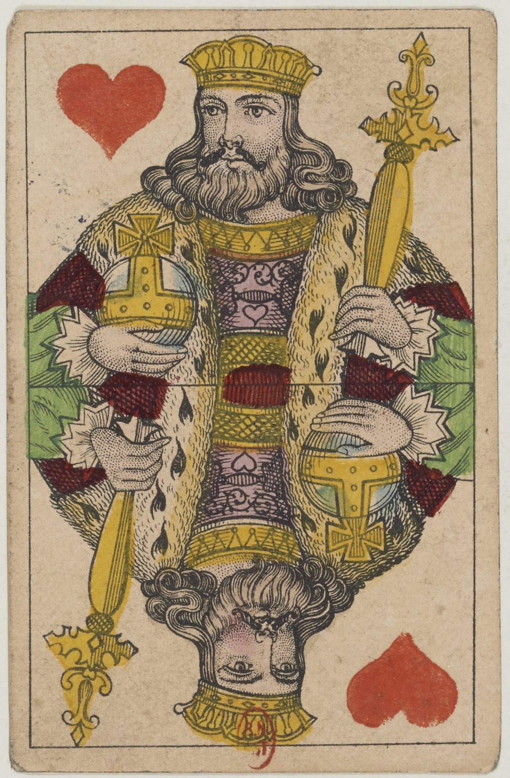 Król Kier z Wzoru Holenderskiego